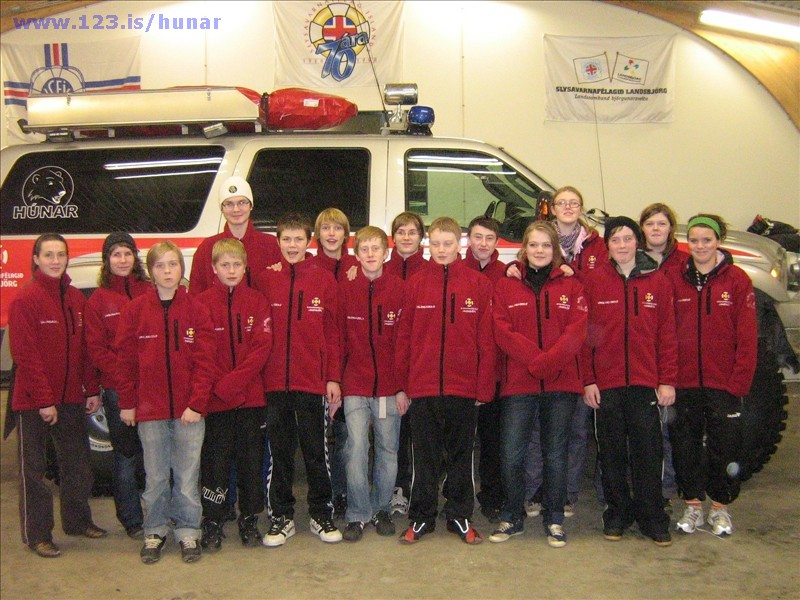 Unglingadeildin Skjöldur